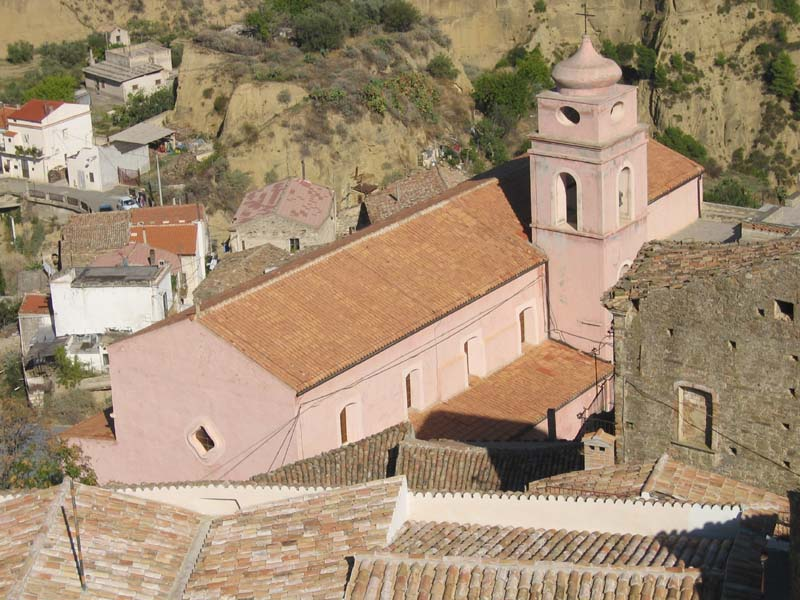 chiesta di Santa Maria Maggiore in Rabatana (Tursi)